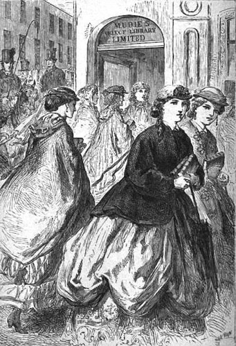 Les dames se rendent chez Mudie's lors de l'arrivée d'un ouvrage